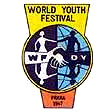 Logo Festival Mundial de la Juventud y los Estudiantes